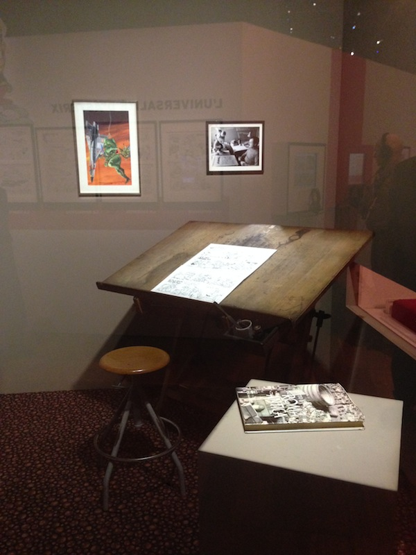 Exposition Astérix à la BnF en présence d'Albert Uderzo